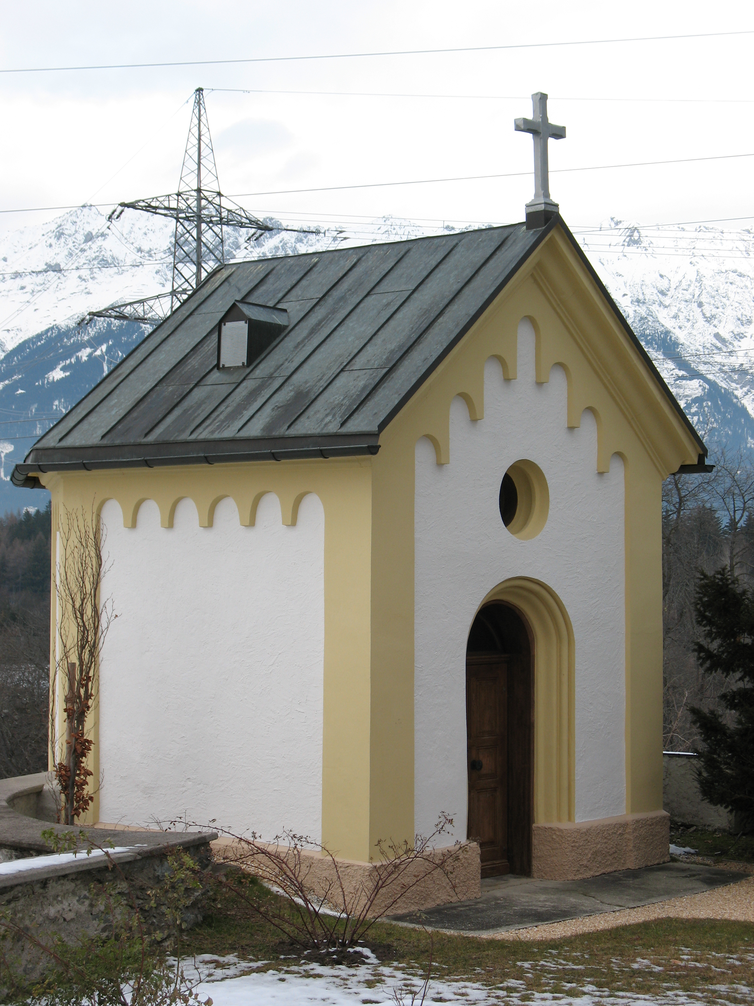 Ansitz Oellacher, Hauskapelle, Brunnen und Garteneinfriedung